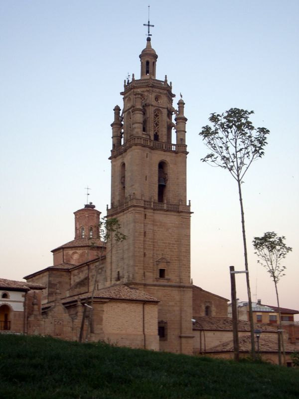 Iglesia de Los Arcos. Foto desde el albergue